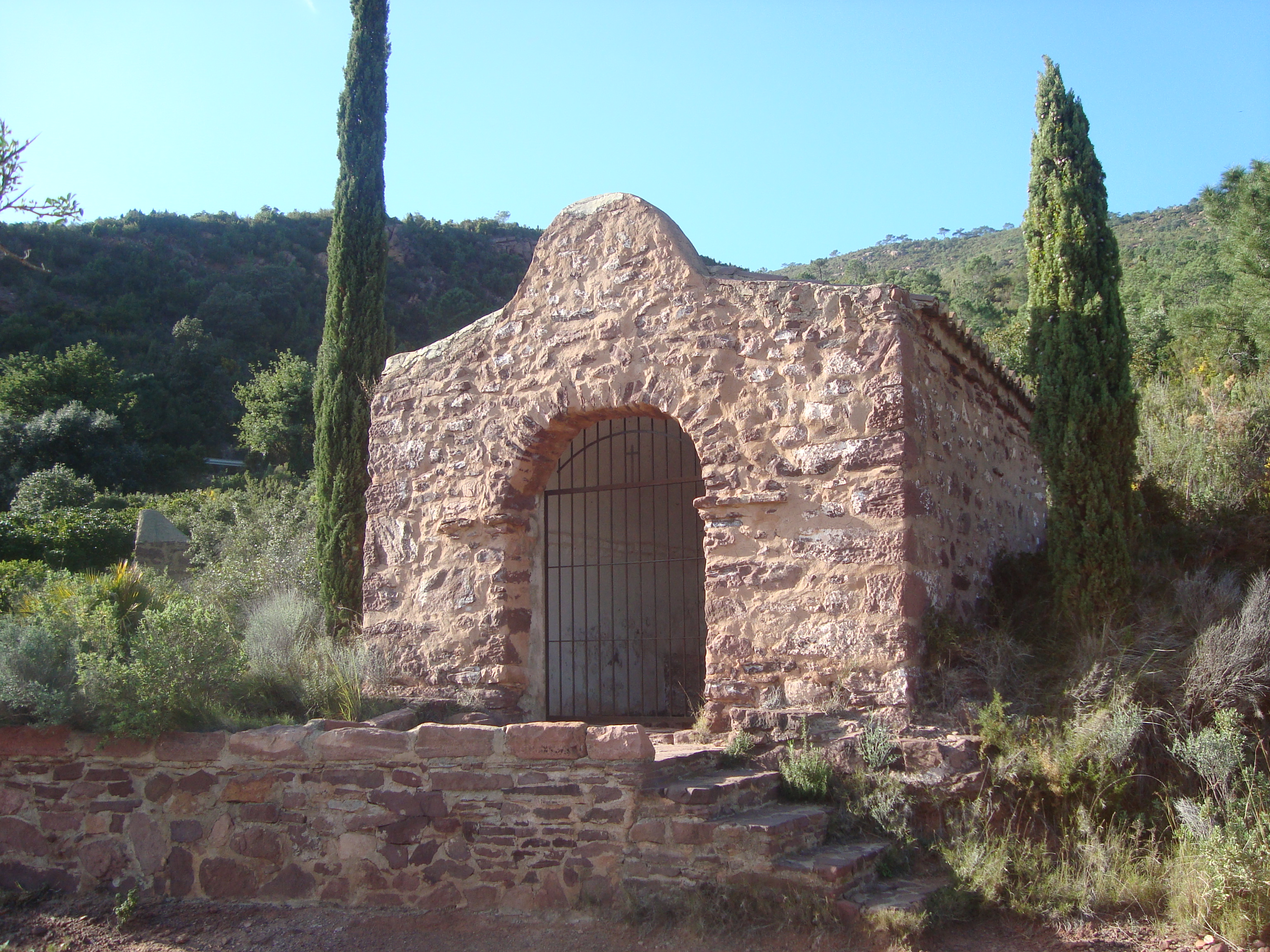 Antre de Crist crucificat (Benicàssim)